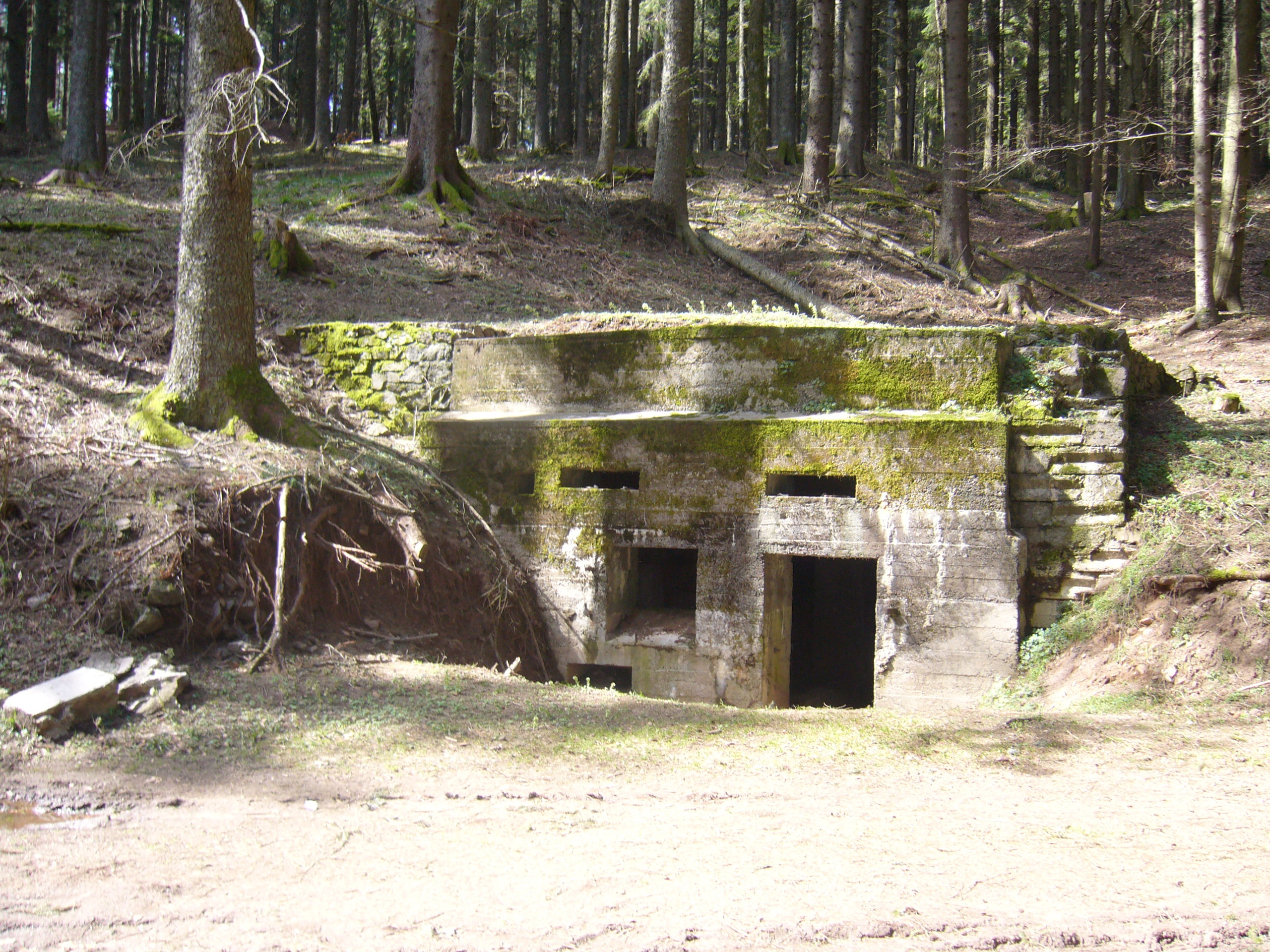 Sainte Marie-aux-Mines. Autre bunker au Violu